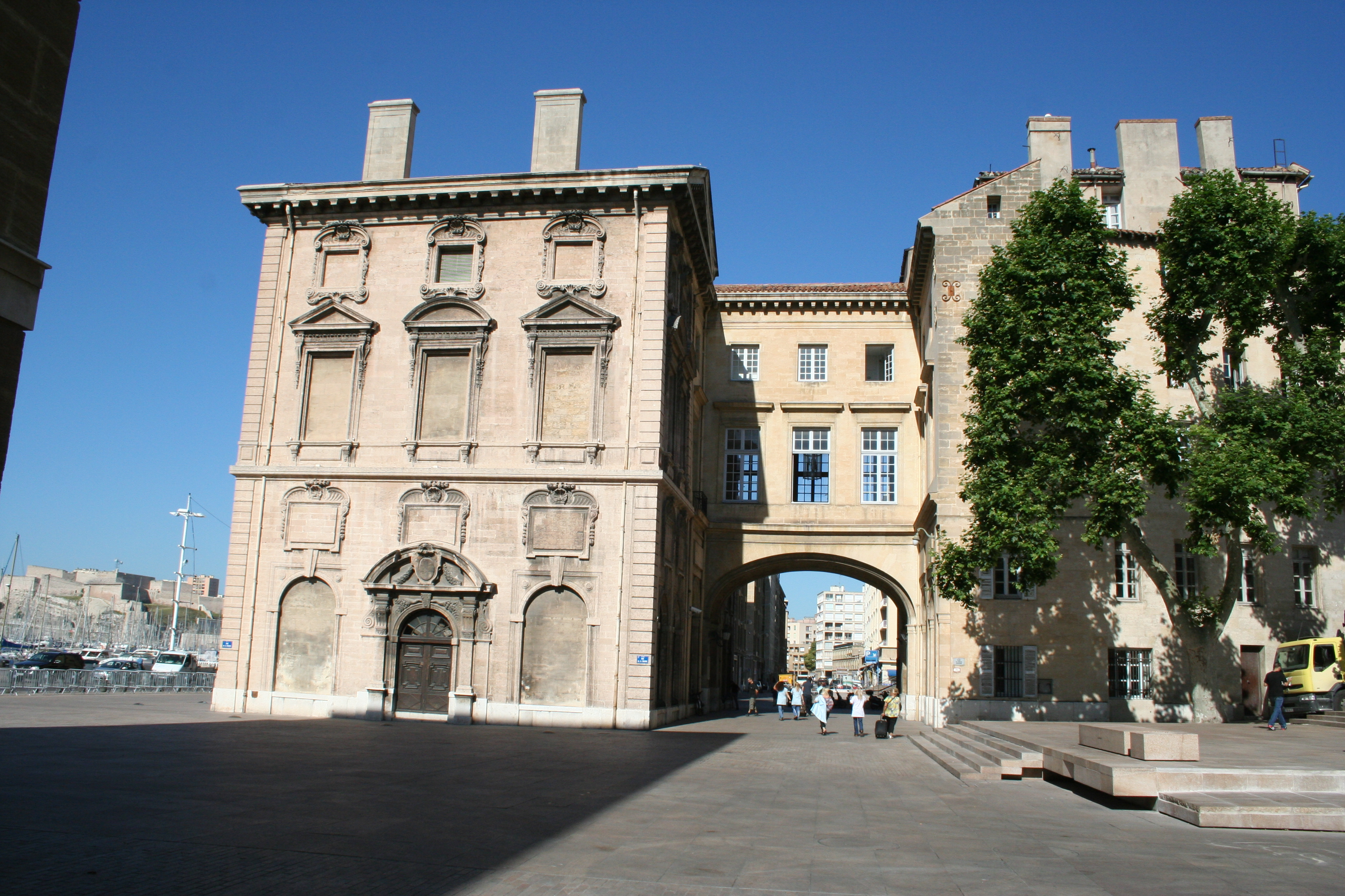 Hôtel de ville de Marseille, pont d'accés au premier étage.